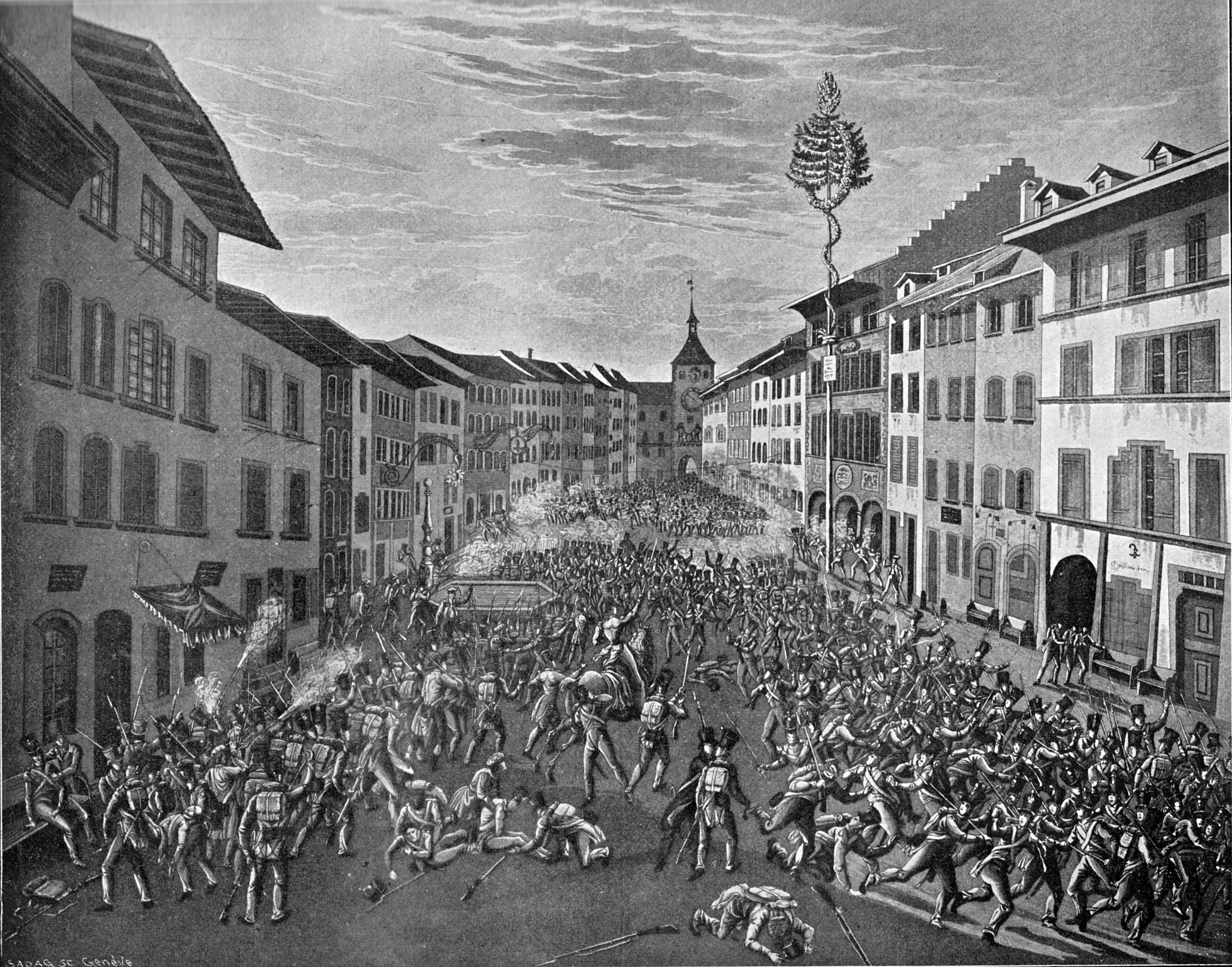 Kampf beim oberen Tor in Liestal zwischen Truppen der Stadt Basel und Verbänden der Basler Landschaft 1831. Eidgenössische Kupferstichsammlung.